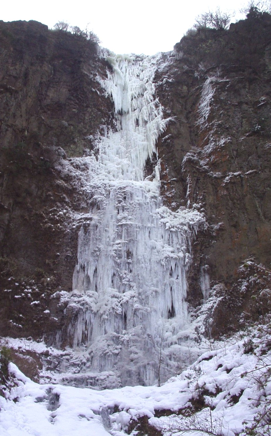 熊本県阿蘇市の古閑の滝。